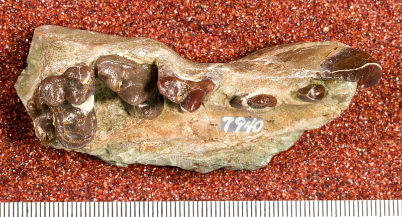 Temnocyon altigenis maxilla